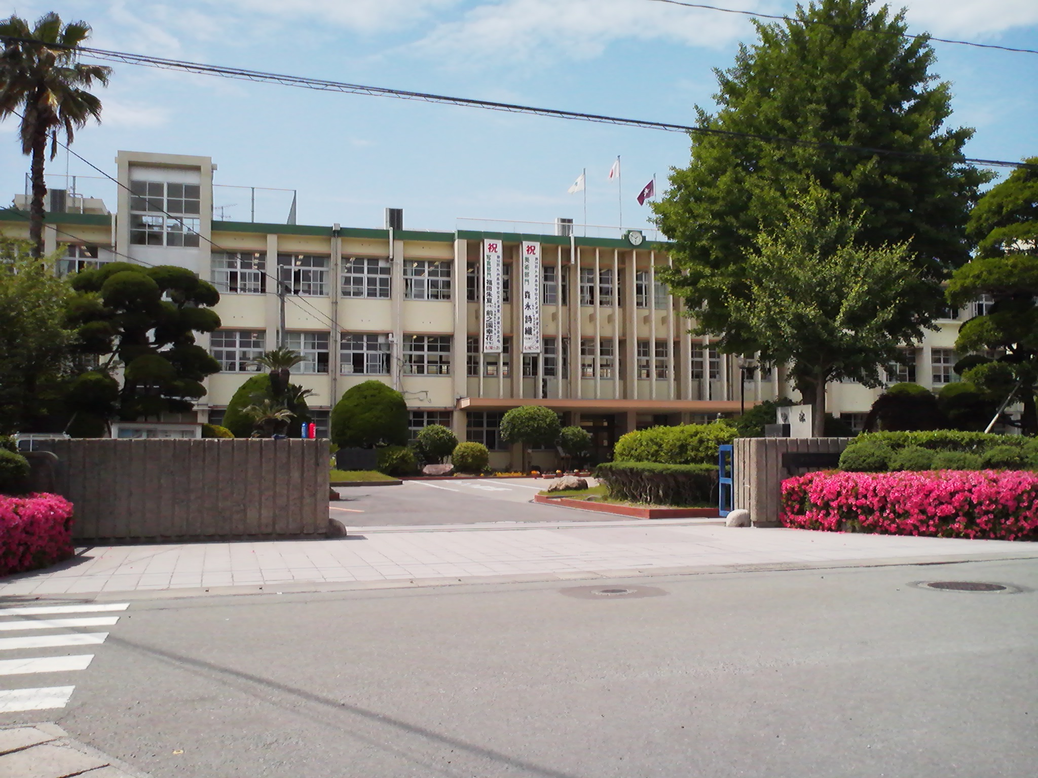 鹿児島県立伊集院高等学校の外観